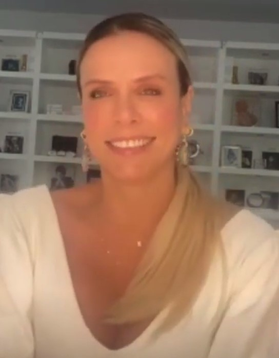 Catalina Maya en 2020